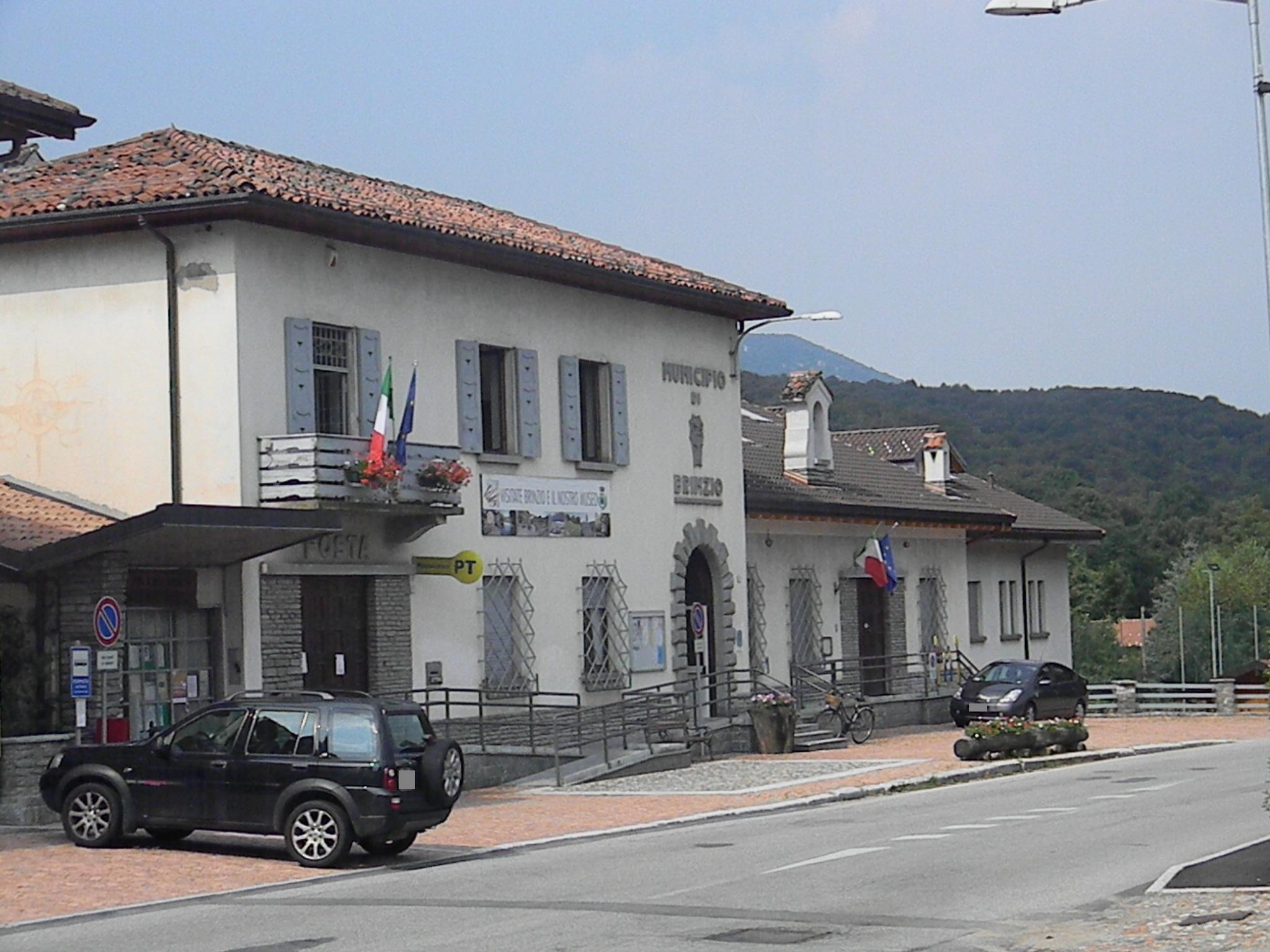 Municipio di Brinzio